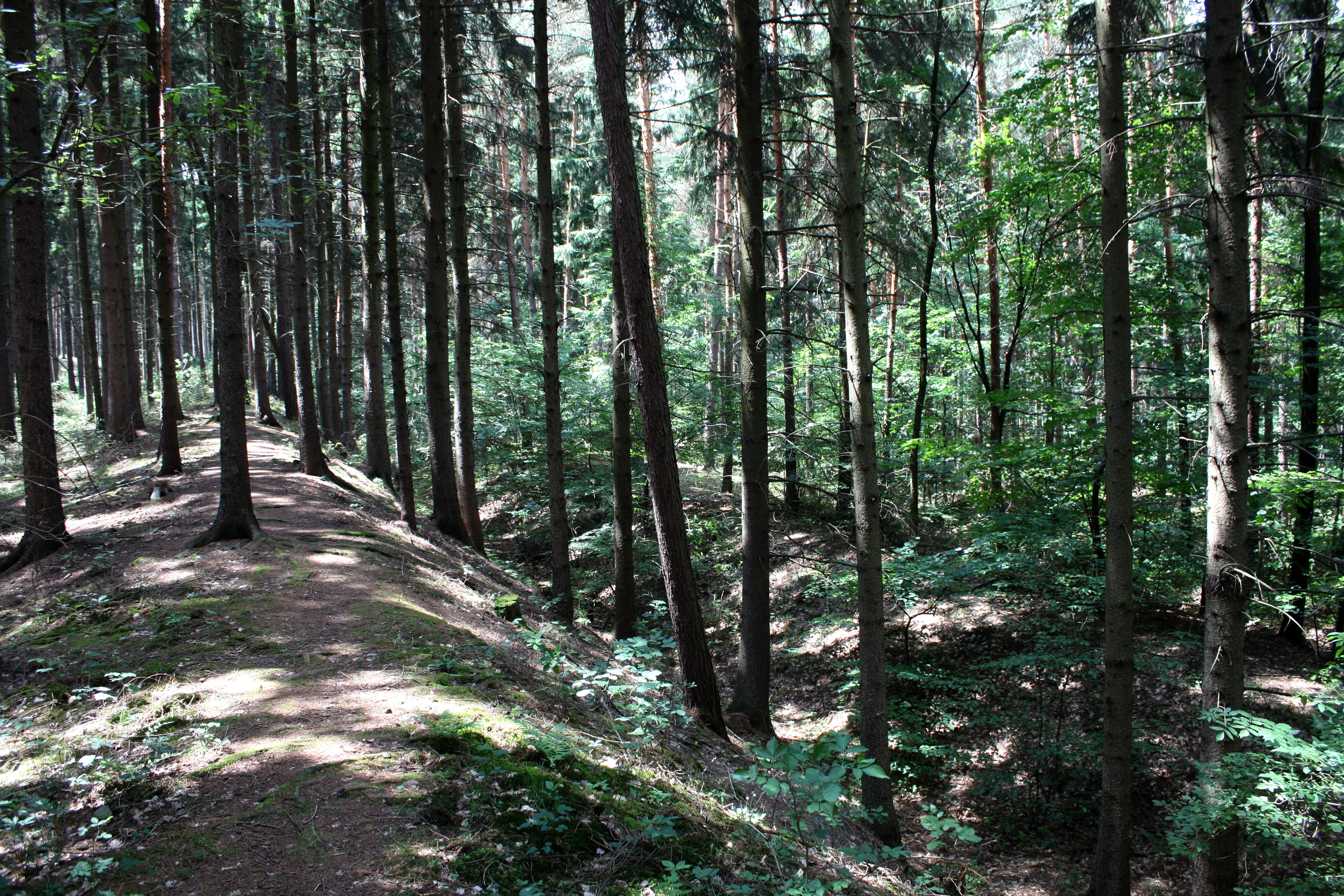 Severní val viereckschanze u Ludéřova na Olomoucku